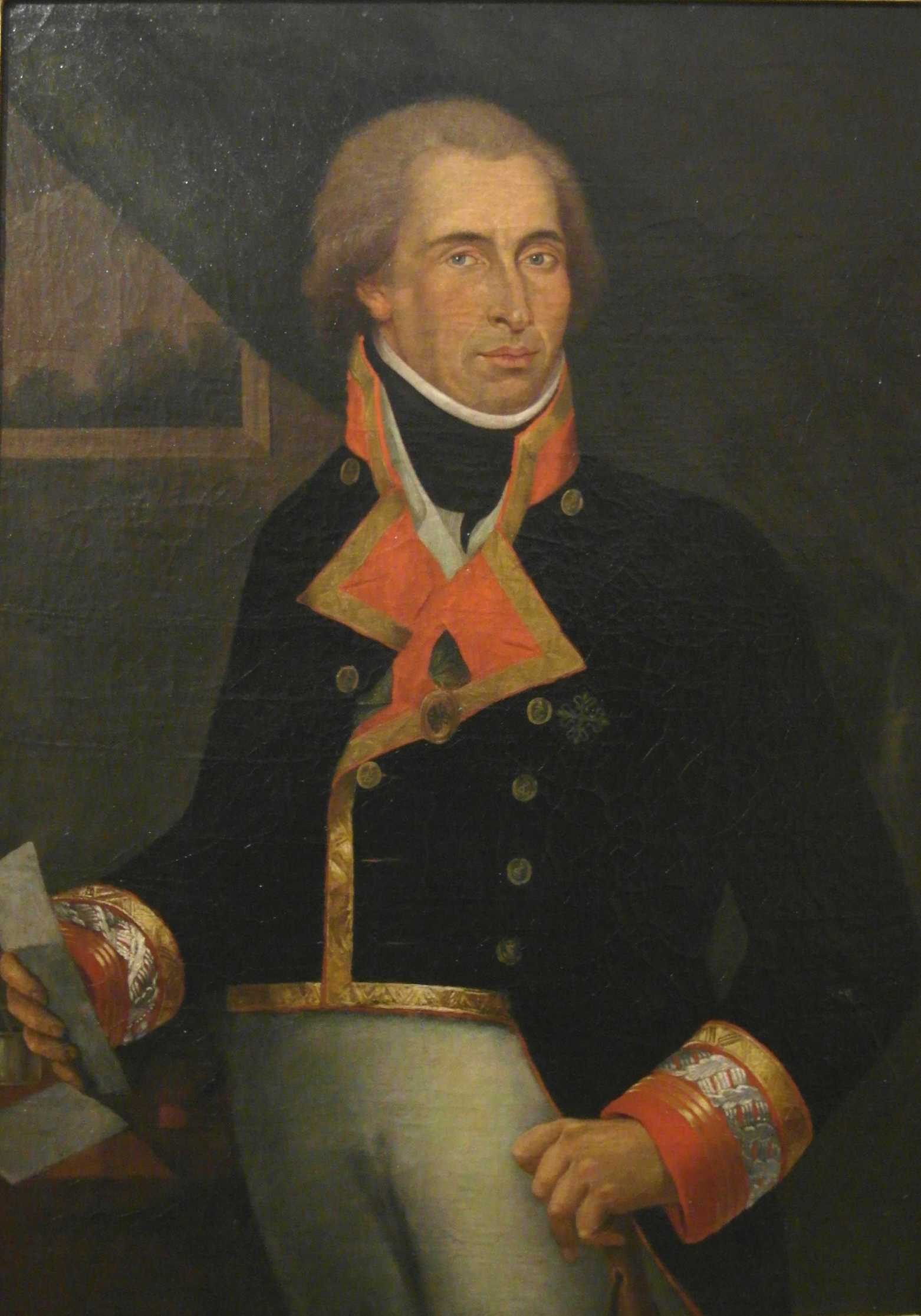 Retrato del marino español Dionisio Alcalá Galiano (1760-1805), que llegó a ser brigadier de la Real Armada Española y murió en la batalla de Trafalgar, el día 21 de octubre de 1805. El retratado aparece de medio cuerpo y de frente y con la cruz de caballero de la Orden de Alcántara bordada en el pecho. Y viste uniforme pequeño de brigadier de la Real Armada y de comandante general de Pilotos. Este retrato es una obra anónima de la escuela napolitana.